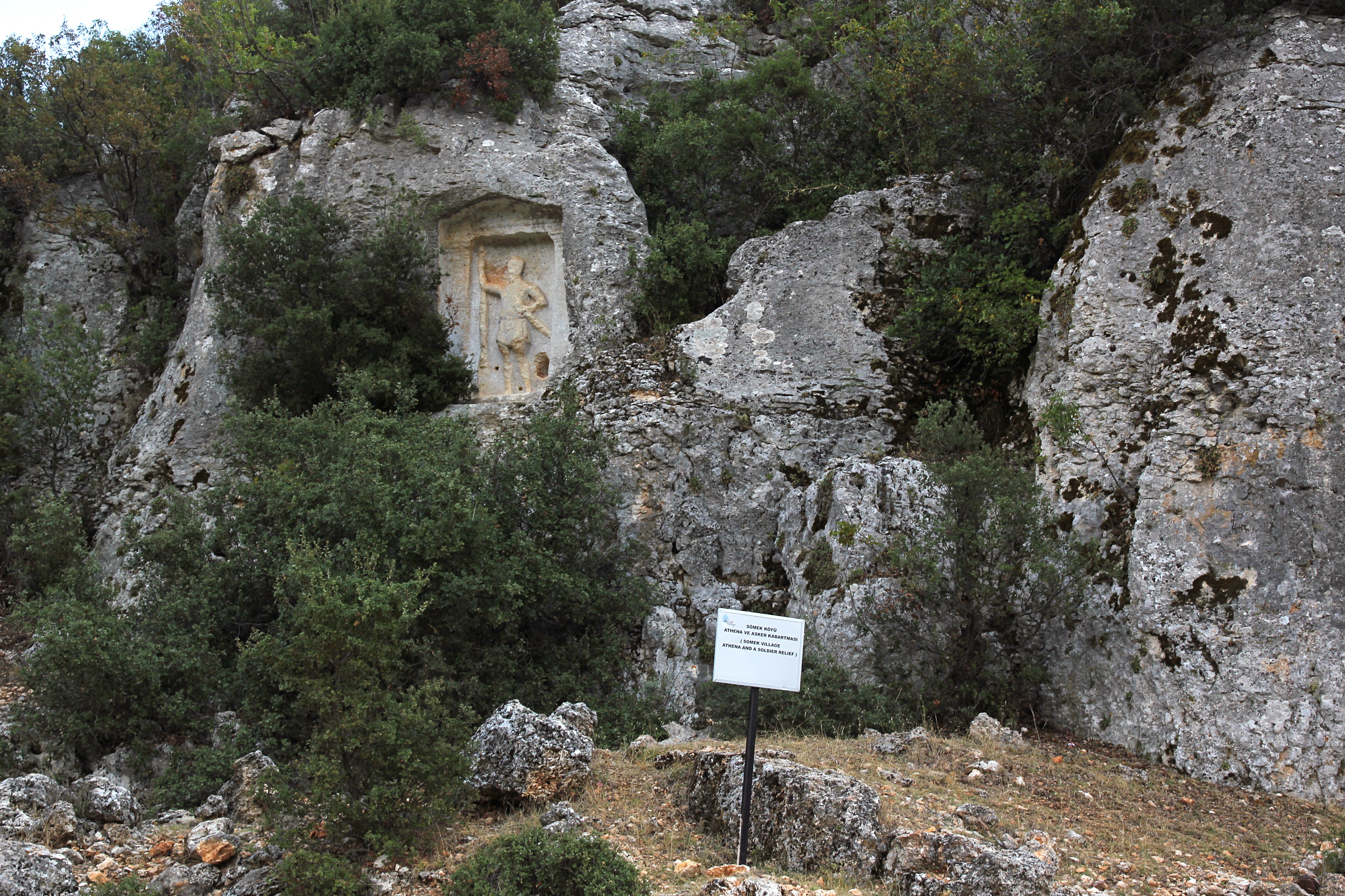 Relief eines Kriegers bei Efrenk, nahe Kızkalesi, Landkreis Erdemli, Südtürkei